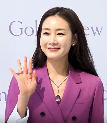 [포토월] 클래스가 다르다